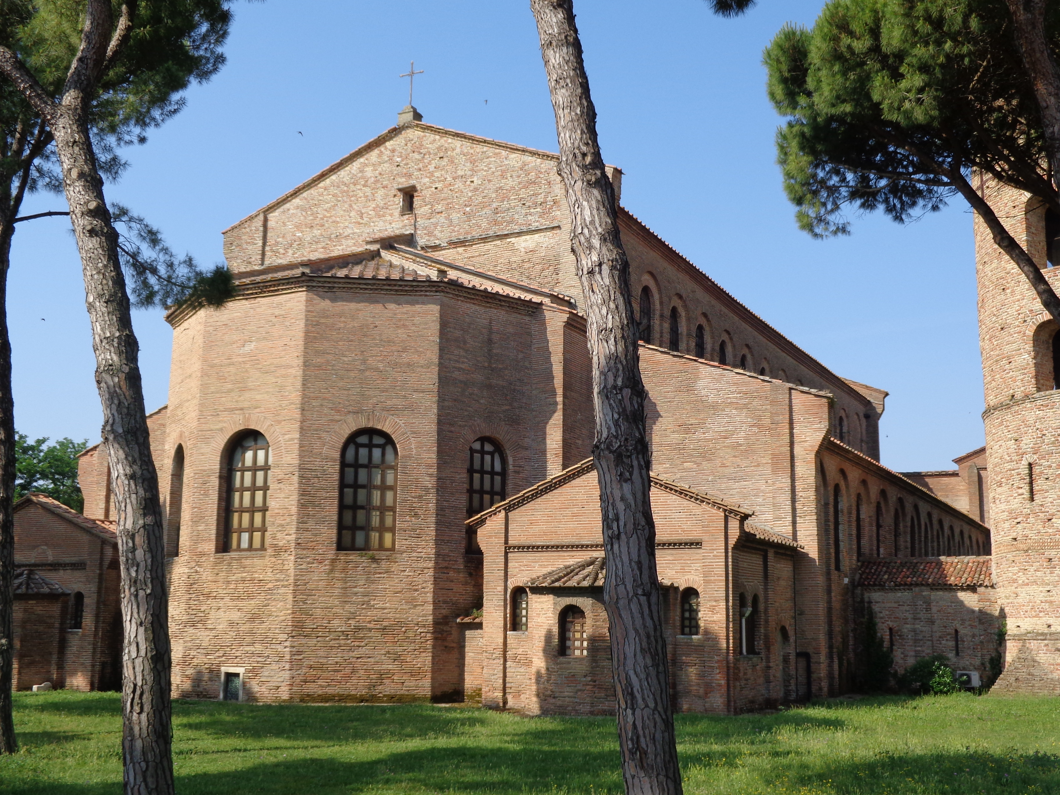 Sant'Apollinare in Classe, Ravenna This is a photo of a monument which is part of cultural heritage of Italy.